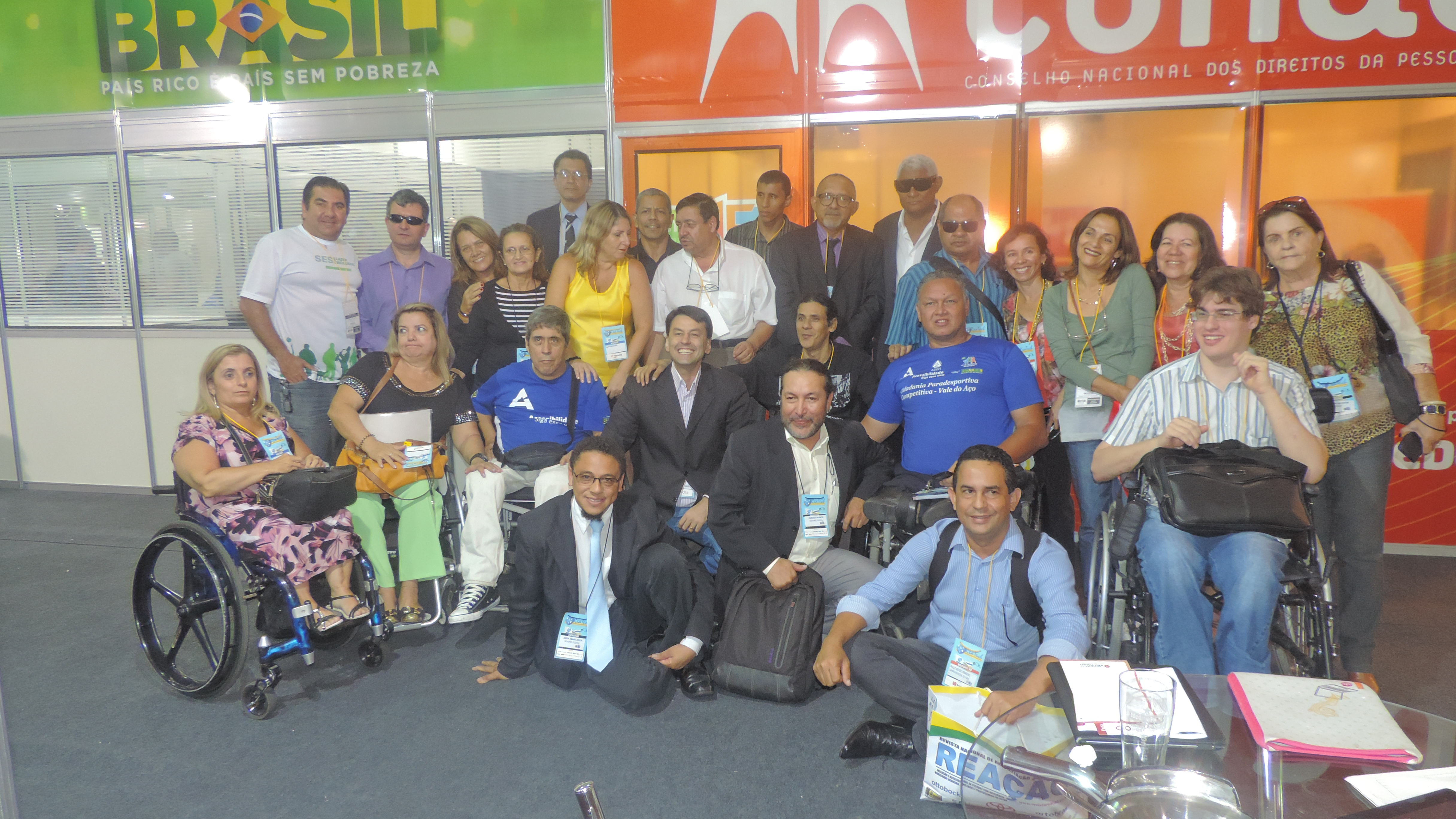 Conselheiros do Conade e demais convidados em frente ao estande do colegiado durante a Reatech 2014.